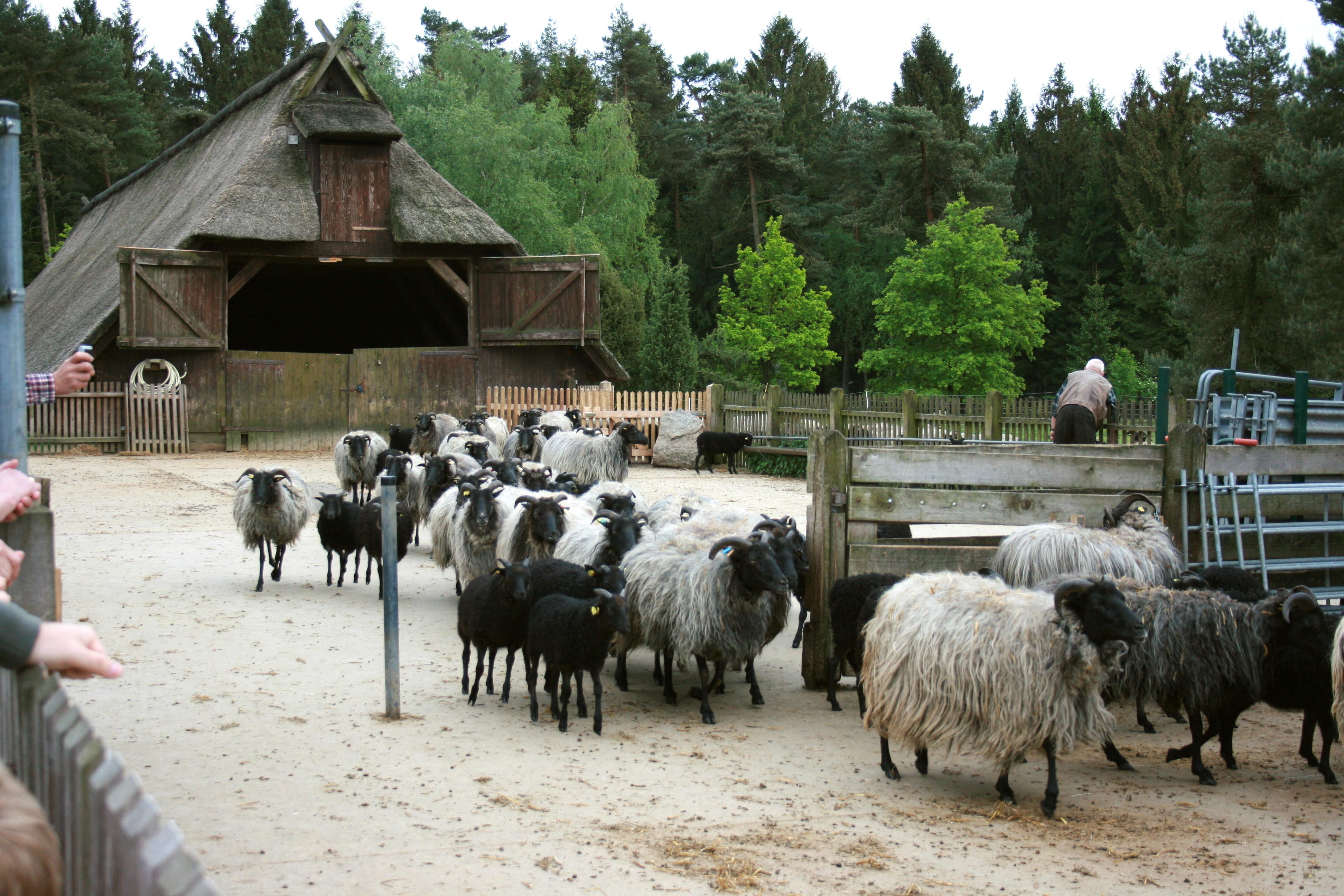 Schäferhof an der Falshorner Straße in Neuenkirchen (Lüneburger Heide)